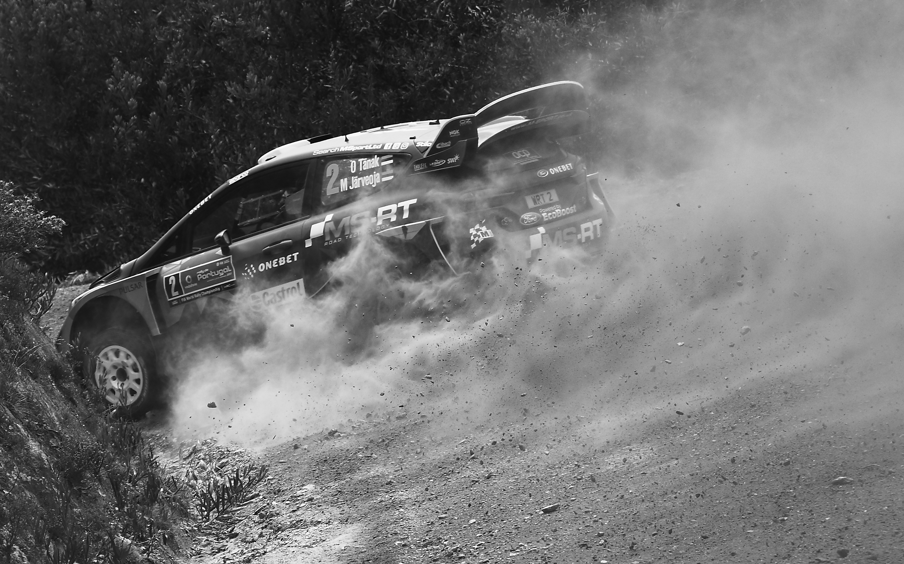 2017 Rally de Portugal